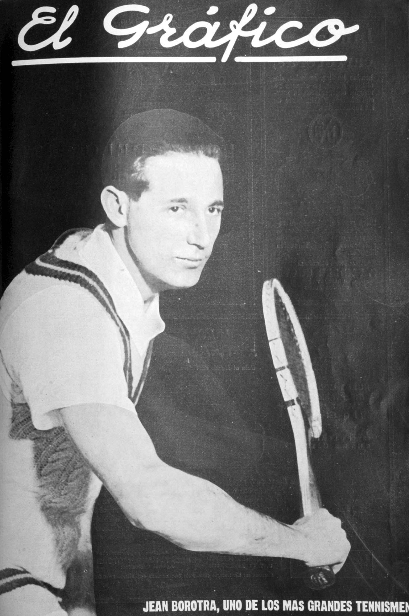 El Grafico del 05 de Noviembre de 1927. Edicion 435